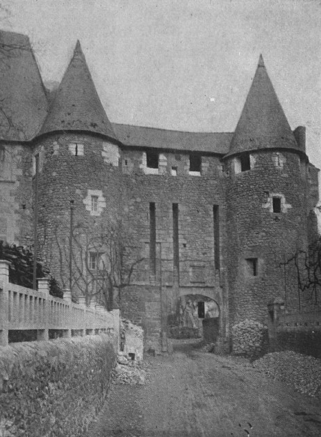 Abbaye de Villeloin : porte d'entrée fortifiée sud - XVème siècle